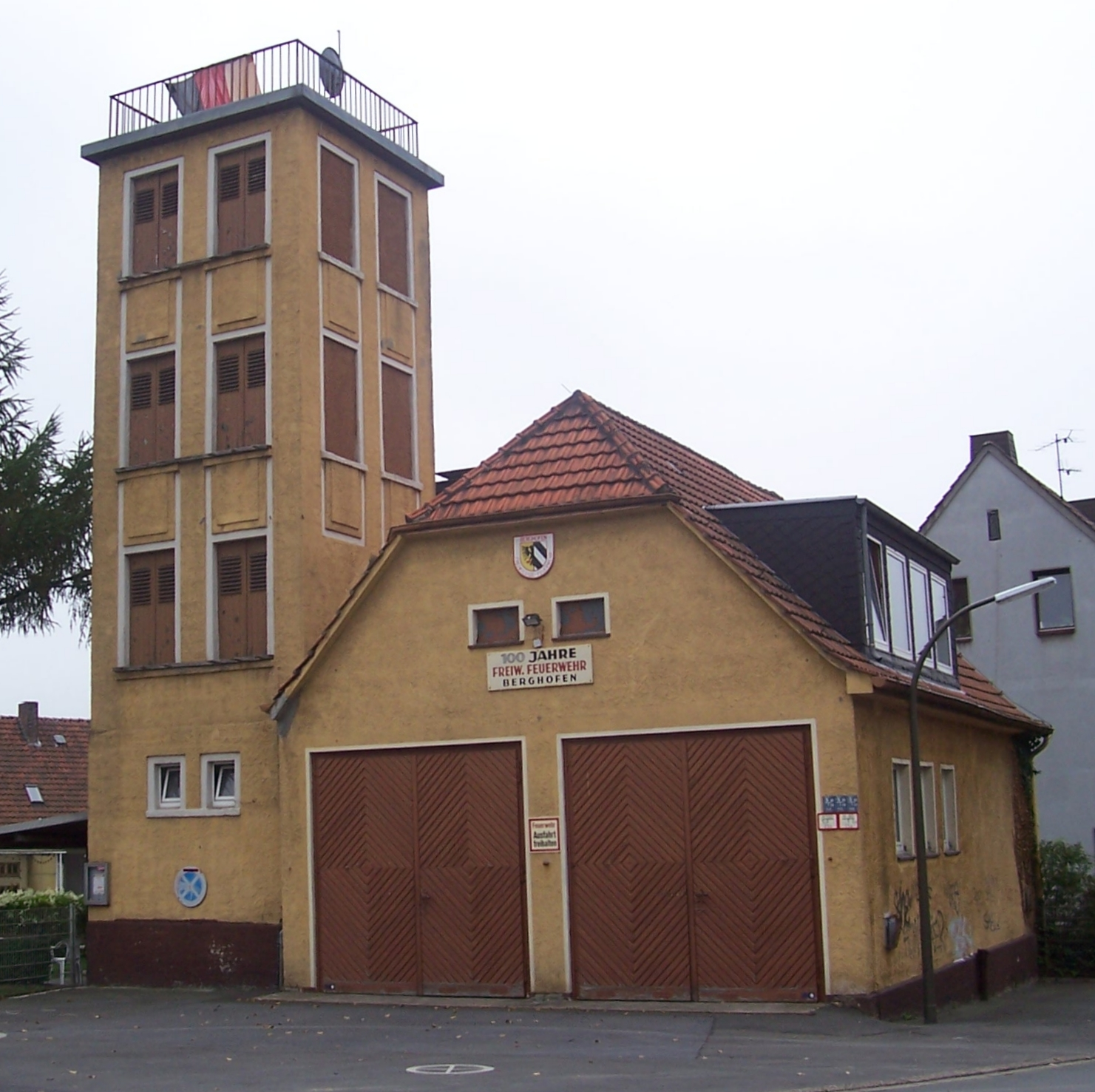 Gerätehaus des Löschzug 13, Fire station in Dortmund-Berghofen, Germany